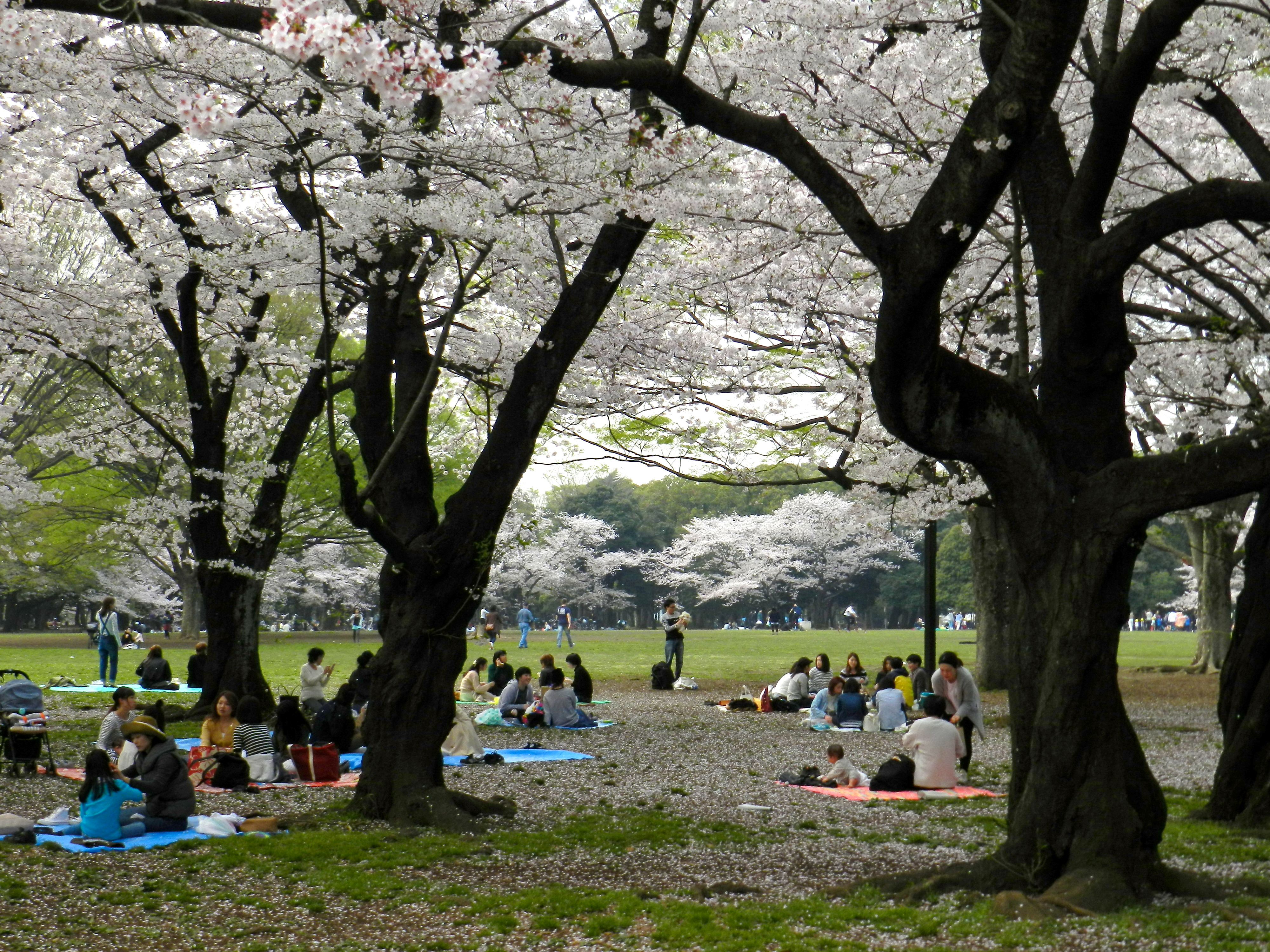 Parc Yoyogi-koen à Tokyo